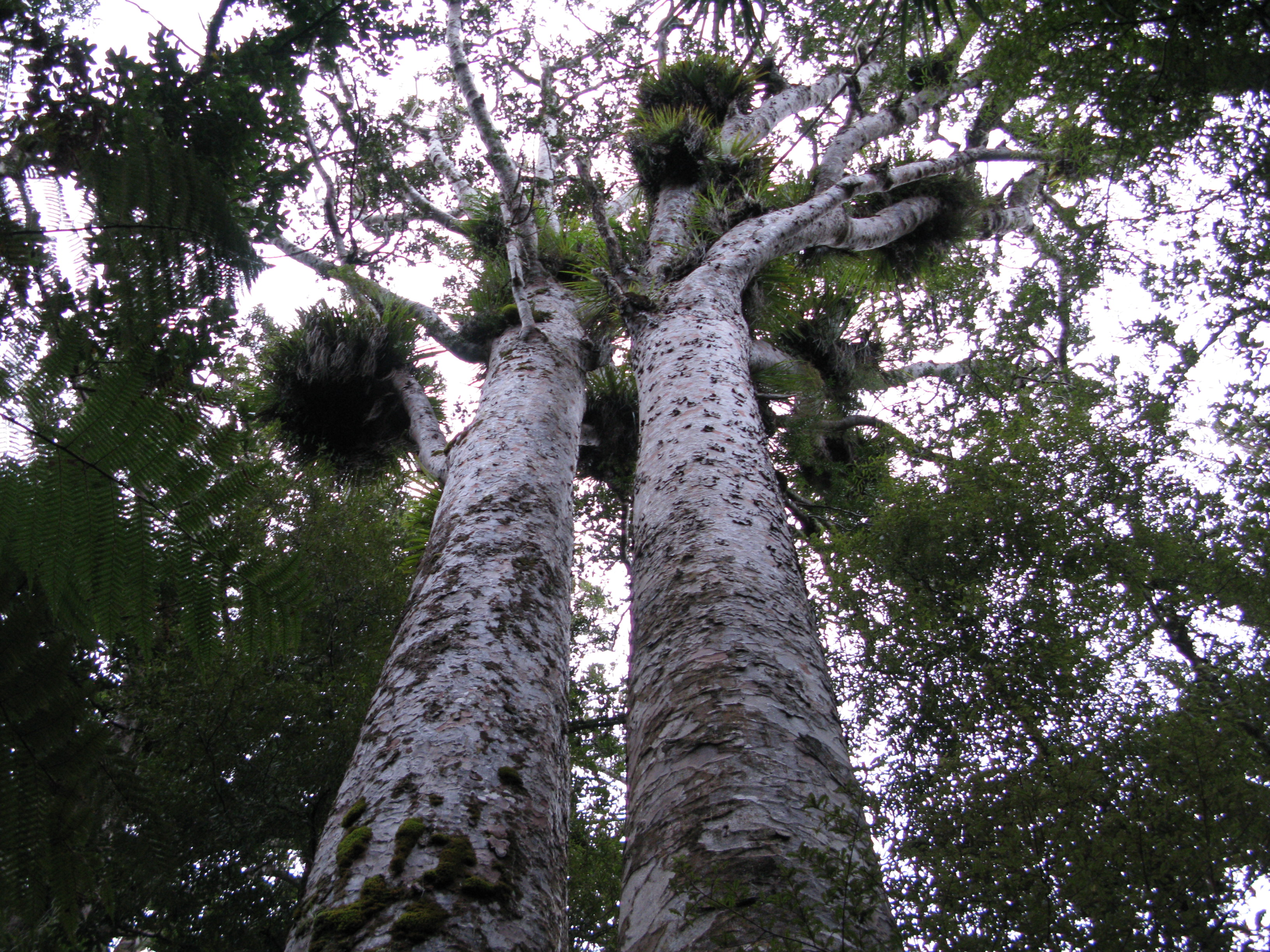 Tane Mahuta Two kauris in Trounson kauri park